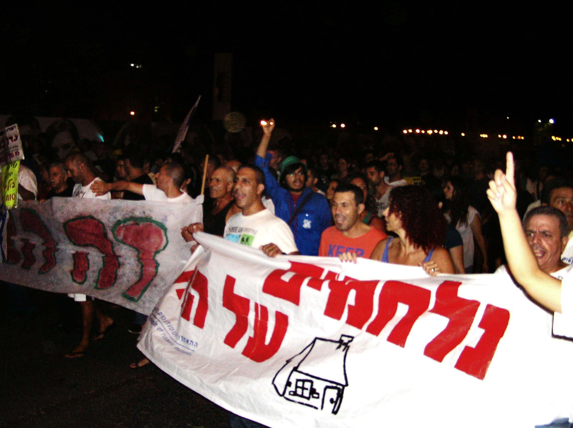 הפגנת המחאה החברתית בבאר שבע ב 30 ביולי 2011